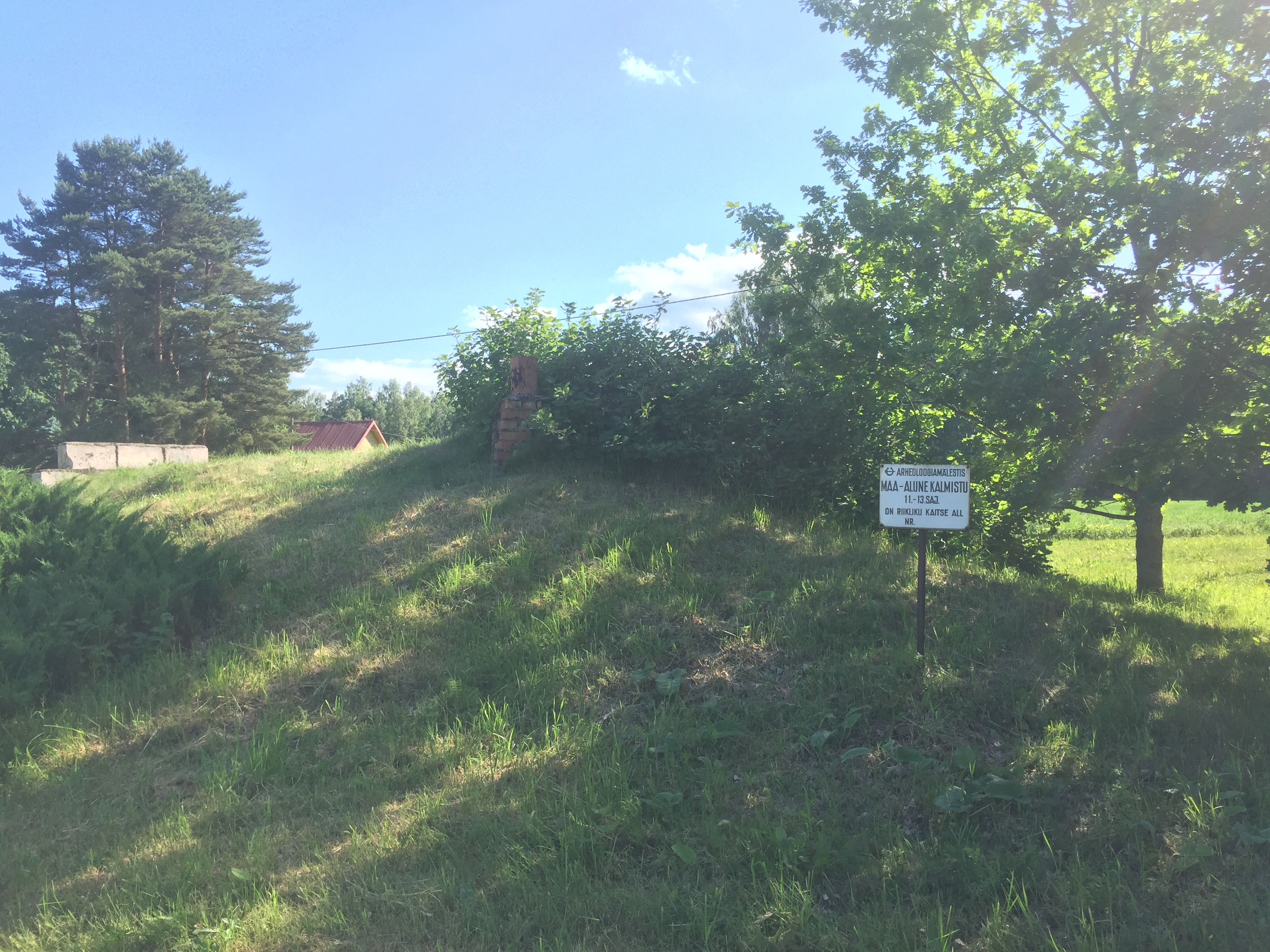 Raatvere maa-alune kalmistu